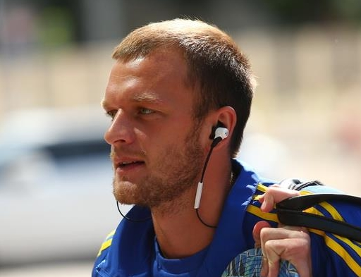 Алексей Владимирович Довгий